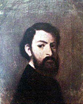 Autoportret